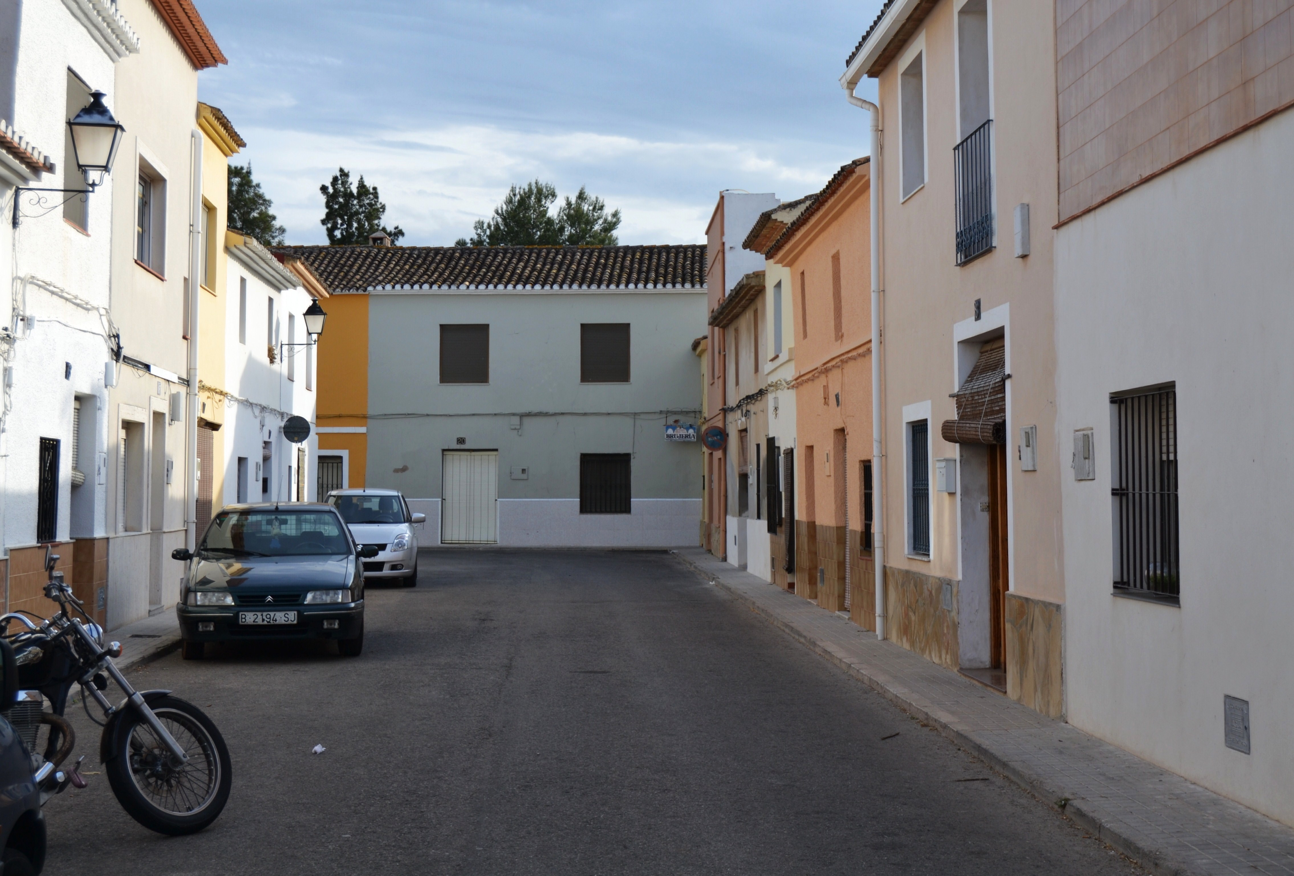 Carrer de Pamis.